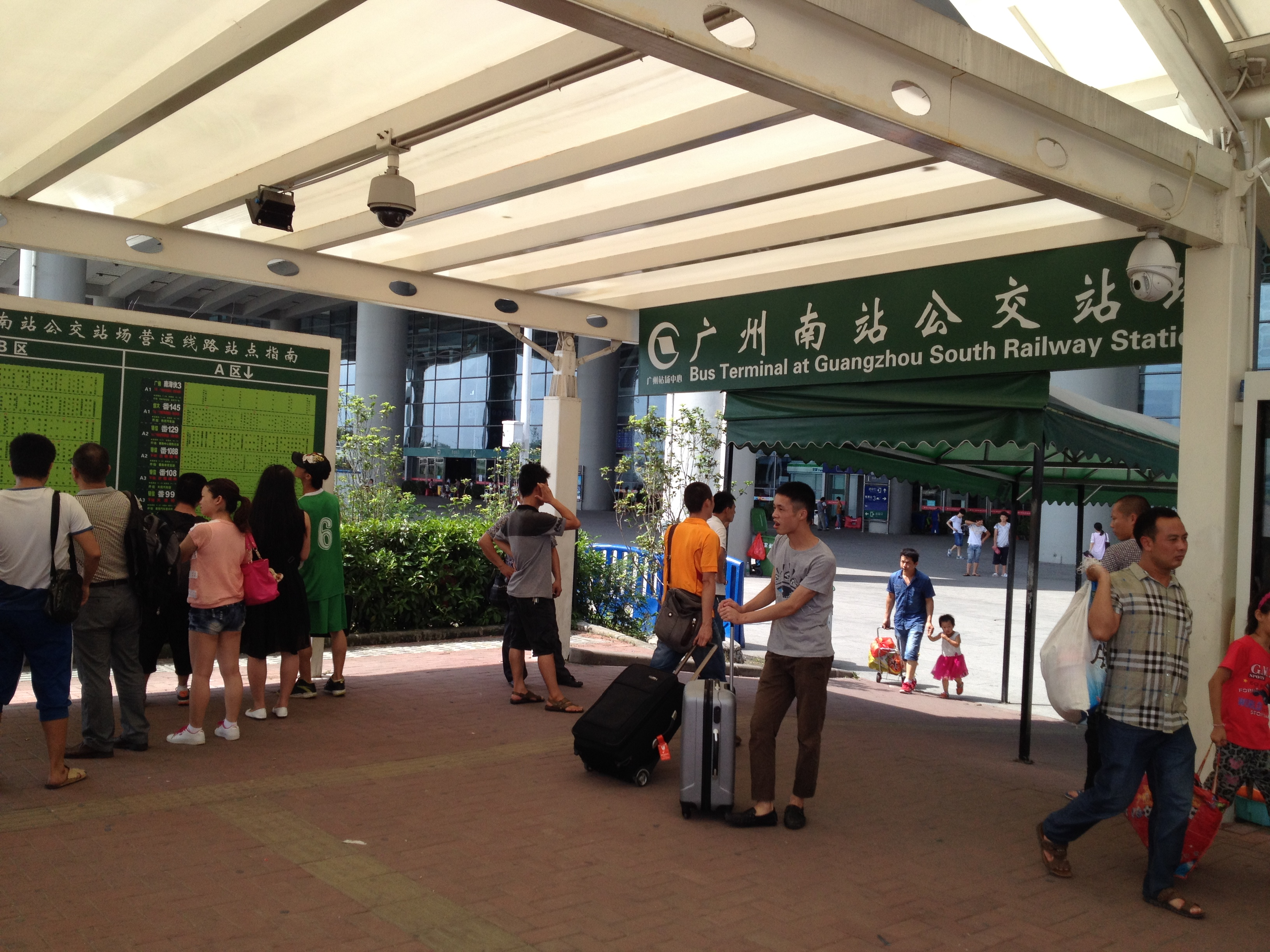 广州火车南站公交站场